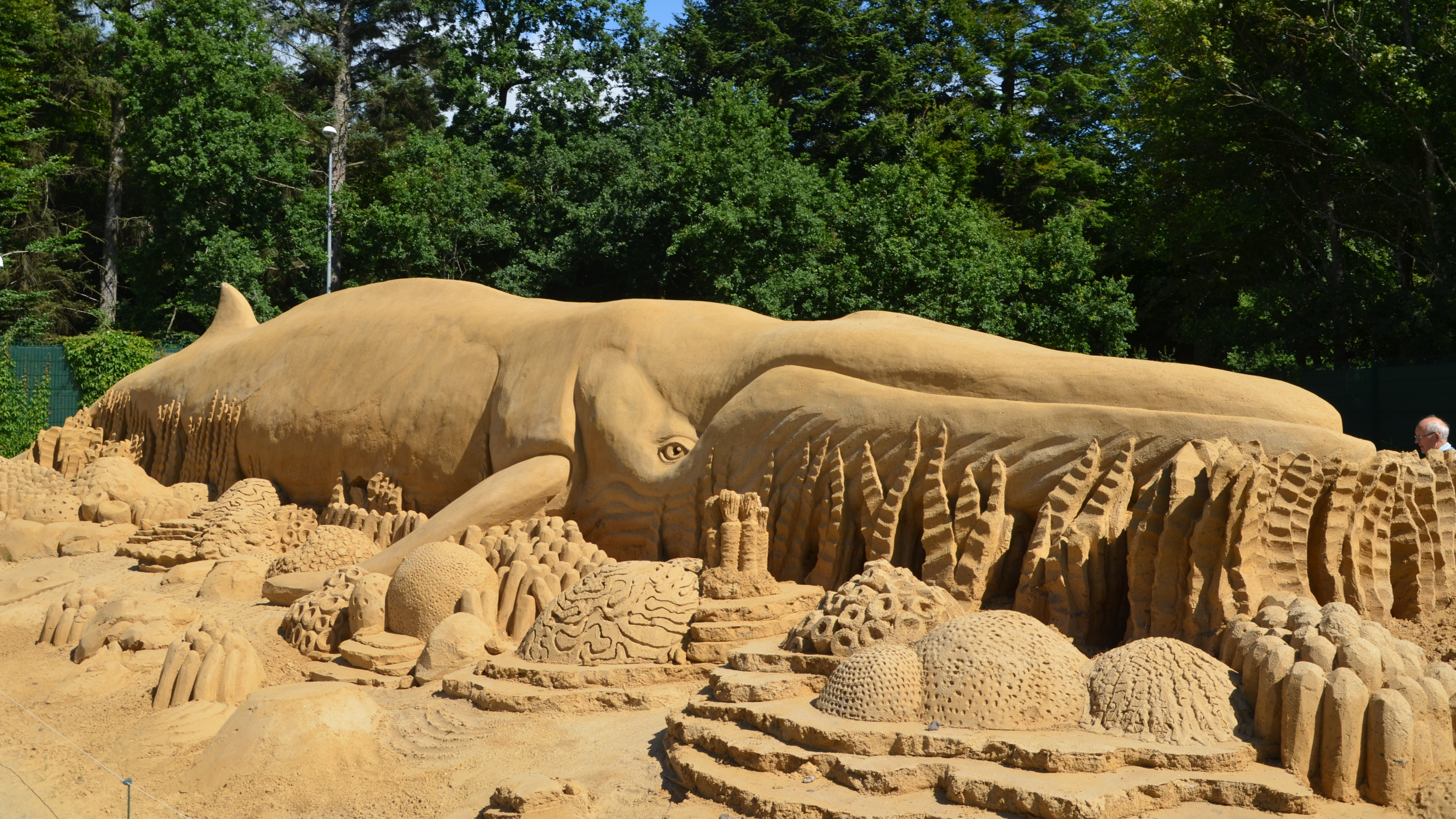 9492 Blokhus, Denmark